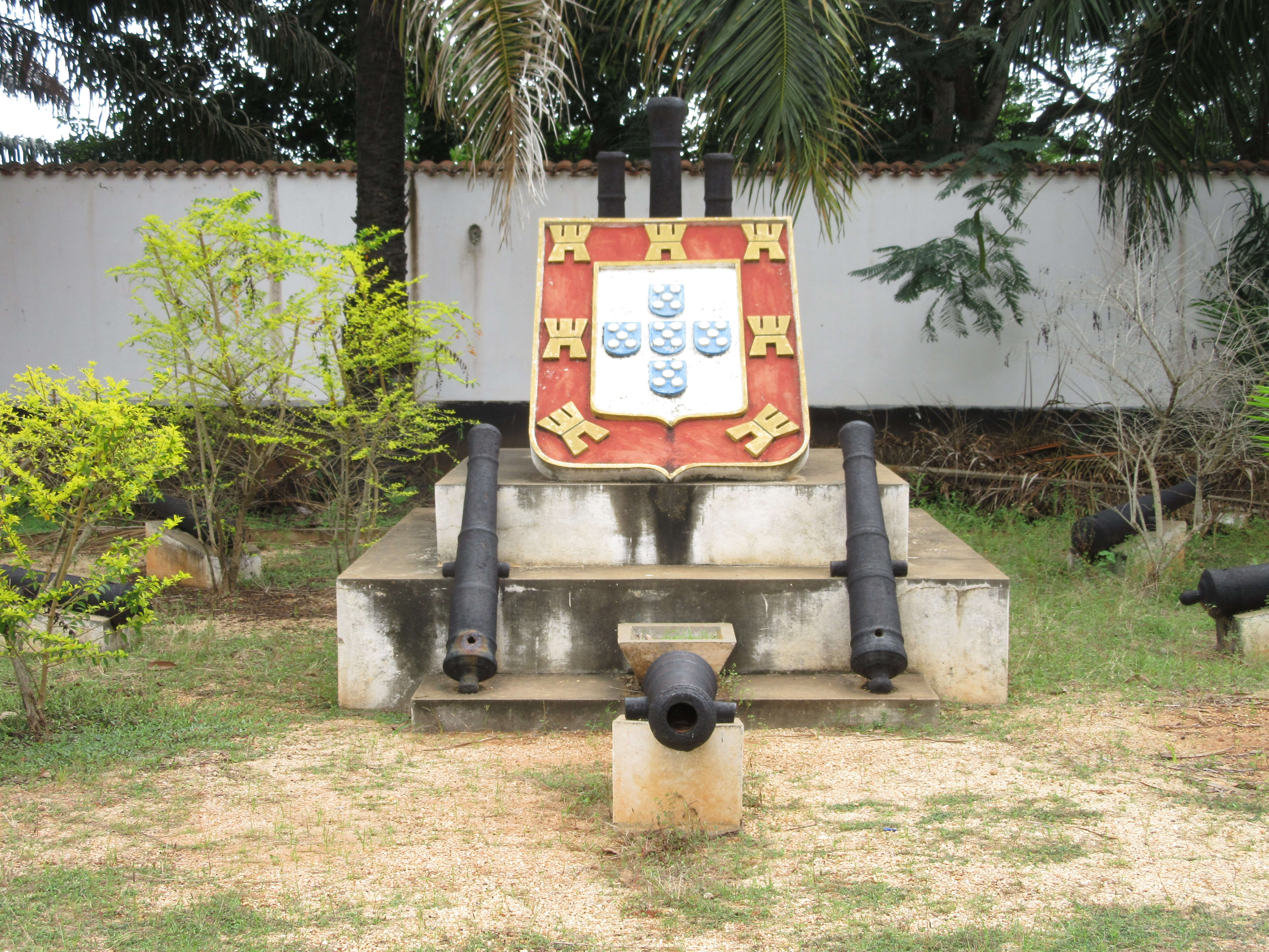 Le Fort Portugais Bâti en 1721, le Fort Portugais de Ouidah portait le nom de Saint-Jean-Baptiste d’Ajuda. Ce fort ressemble plus aujourd’hui à une maison coloniale aux murs blancs avec toutefois la présence d’un petit azulejo qui rappelle la Portugal. Dans la cour on peut admirer de magnifiques manguiers et un frangipanier qui doivent avoir de nombreuses histoires à raconter. On apprends qu’il y avait cinq (5) forts à Ouidah : les forts portugais, anglais, français, danois et hollandais. Ils ont tous été brûlés en 1961 après l’Indépendance du Bénin, à l’époque de Salazar. Le fort portugais est resté débout mais les archives ont toutes été détruites. En 1967, la transformation du fort en musée a été opérée par les portugais eux même. Ils ont ainsi rapportés des objets et documents. Aujourd’hui, le fort couvre la surface d’un hectare environ et entre ses murs se trouvent une résidence des représentants officiels du Portugal, une chapelle, une garnison et des casernes. Le musée accueille d’importantes collections accumulées à la suite de plusieurs fouilles archéologiques dans les zones de Savi et de Ouidah. Wikidata has entry Q60852840 with data related to this item.